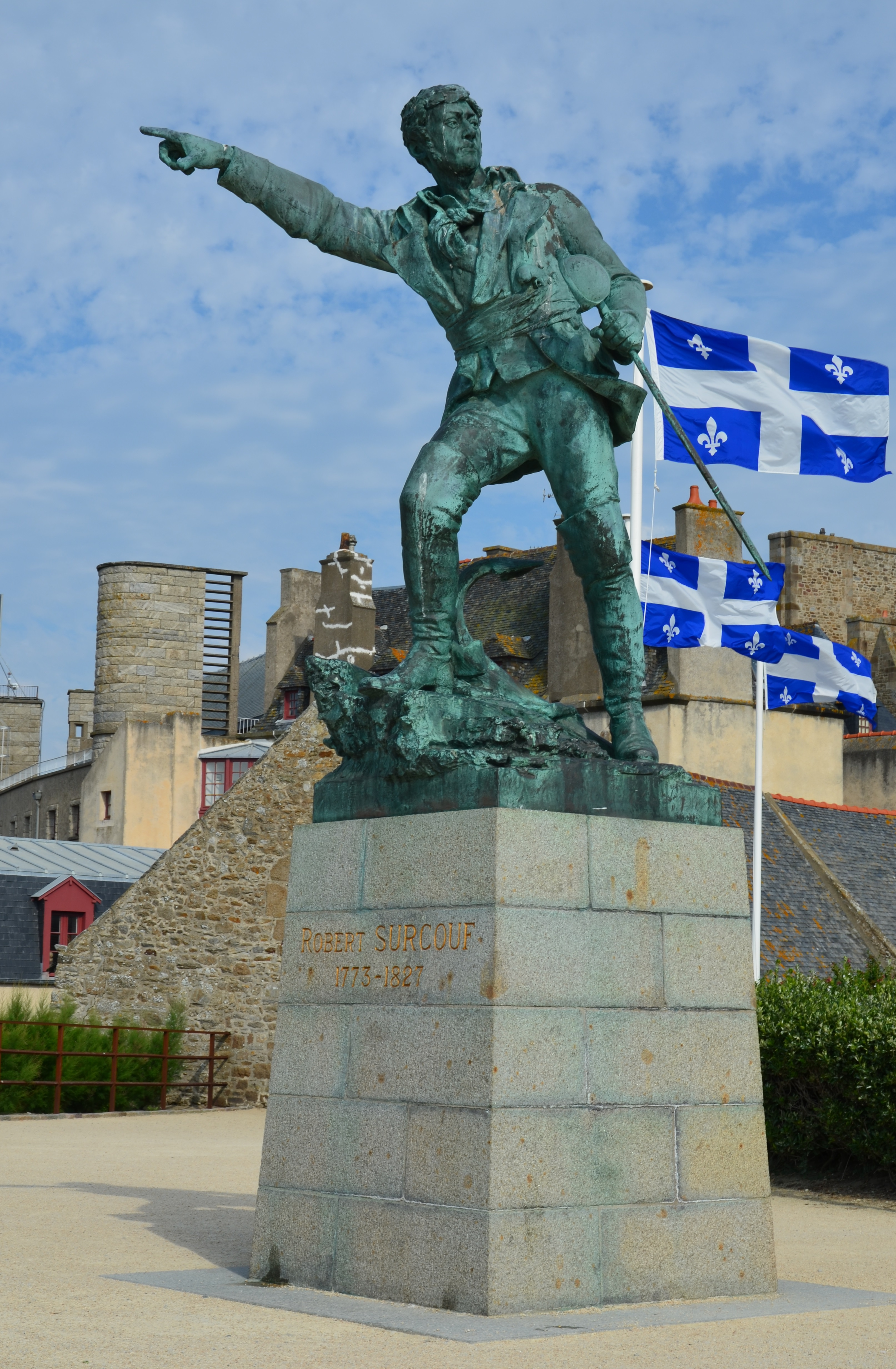 Située sur les remparts de Saint-Malo, cette statue rend hommage à Robert Surcouf (1773-1827) ancien corsaire français de renom, membre de l'ordre national de la Légion d’honneur et réputé pour avoir combattu avec bravoure (et succès) la marine britannique.